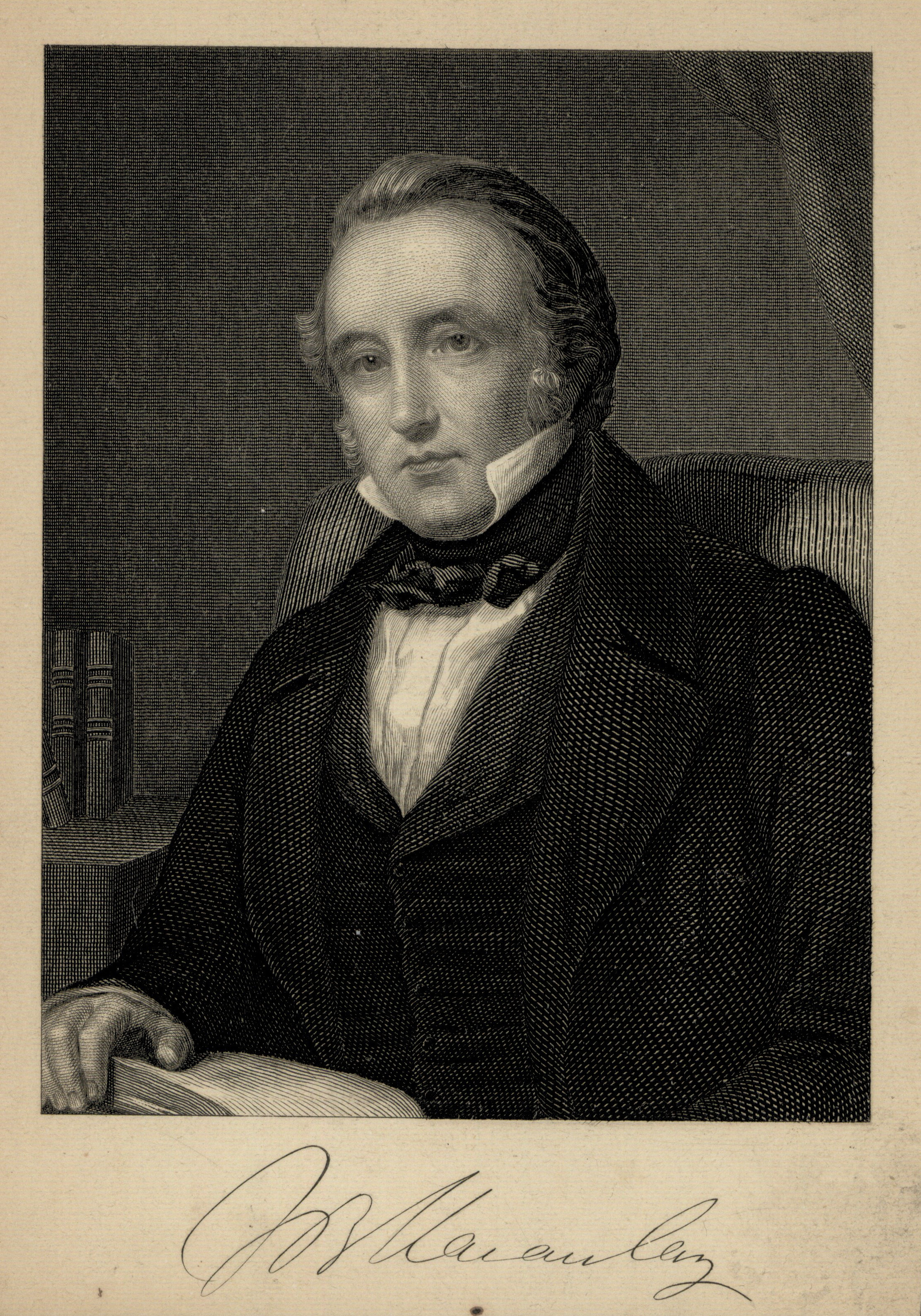 Thomas Babington Macaulay